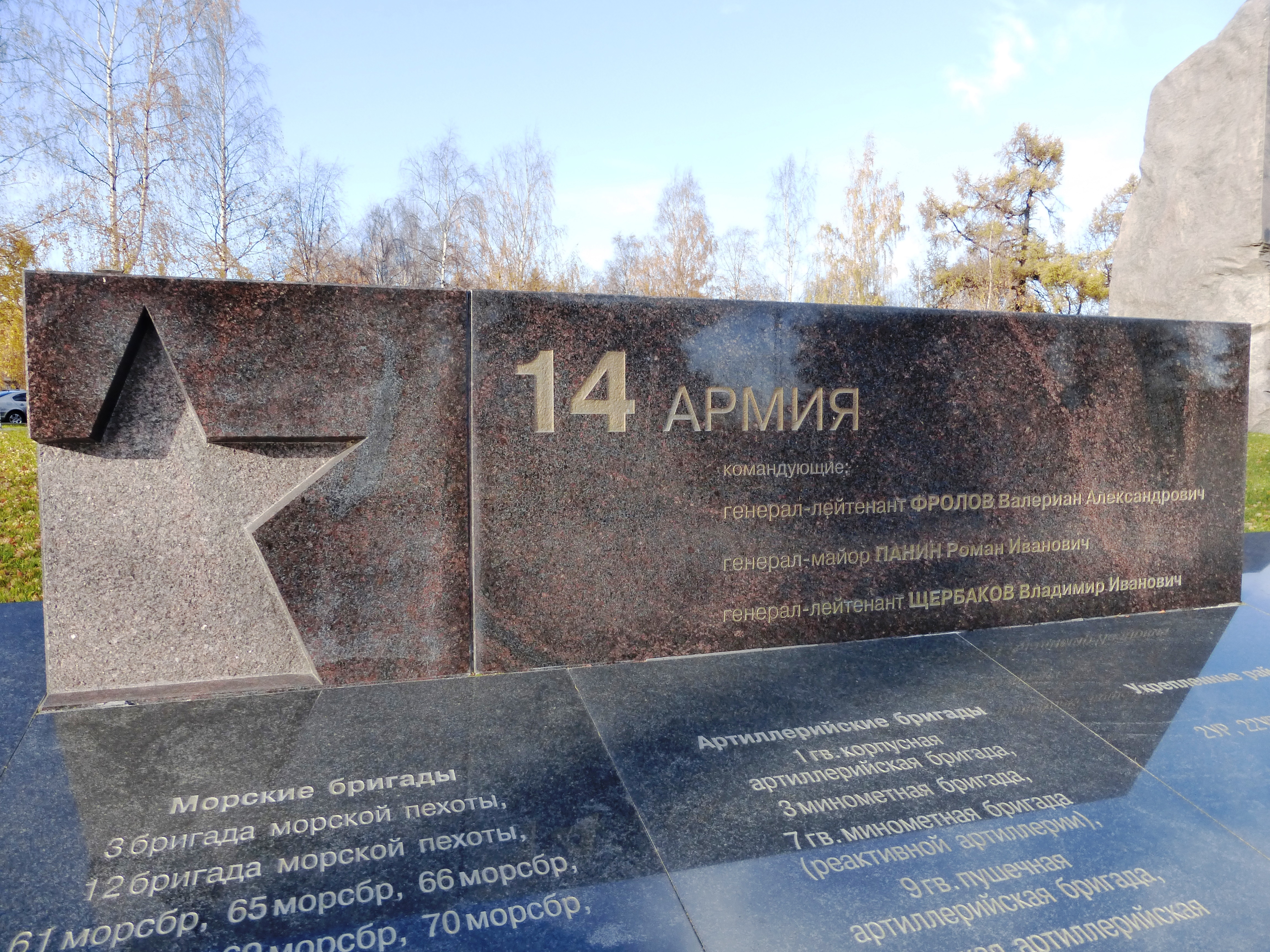 Фрагмент военно-мемориального комплекса Карельского фронта «Аллея памяти и славы» в Петрозаводске